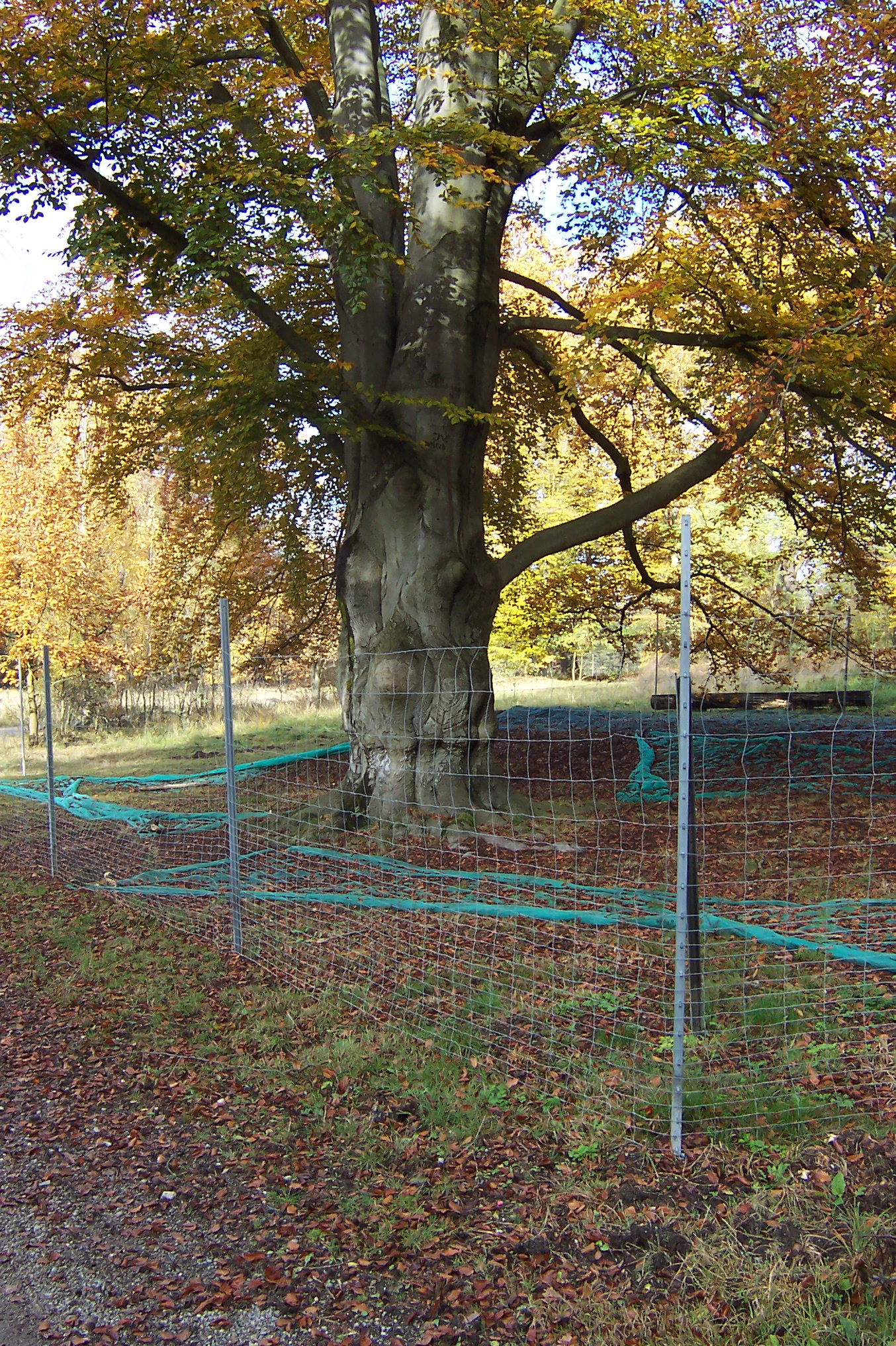 Saatgutsicherung Blutbuche, Standort Oberförsterei Jagdschloss Weißwasser